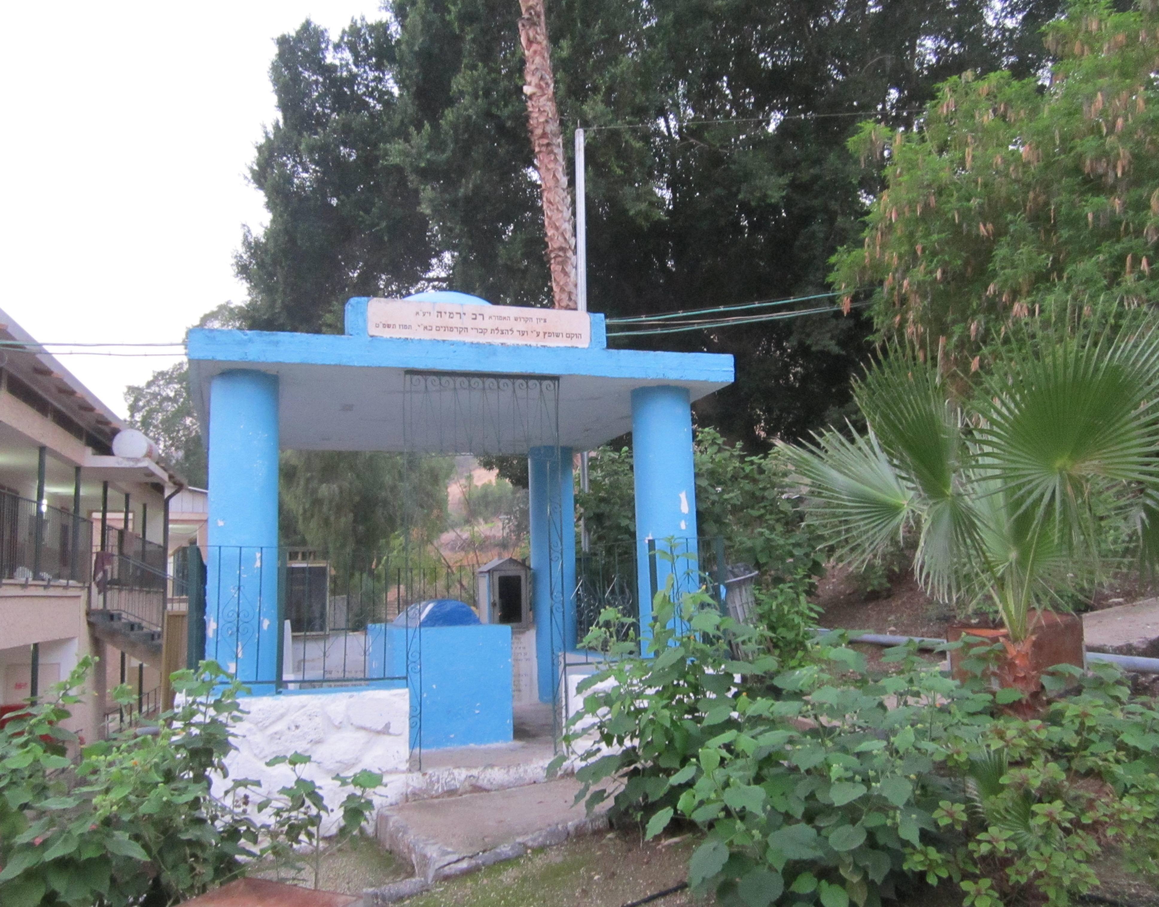 קבר רבי ירמיה בטבריה